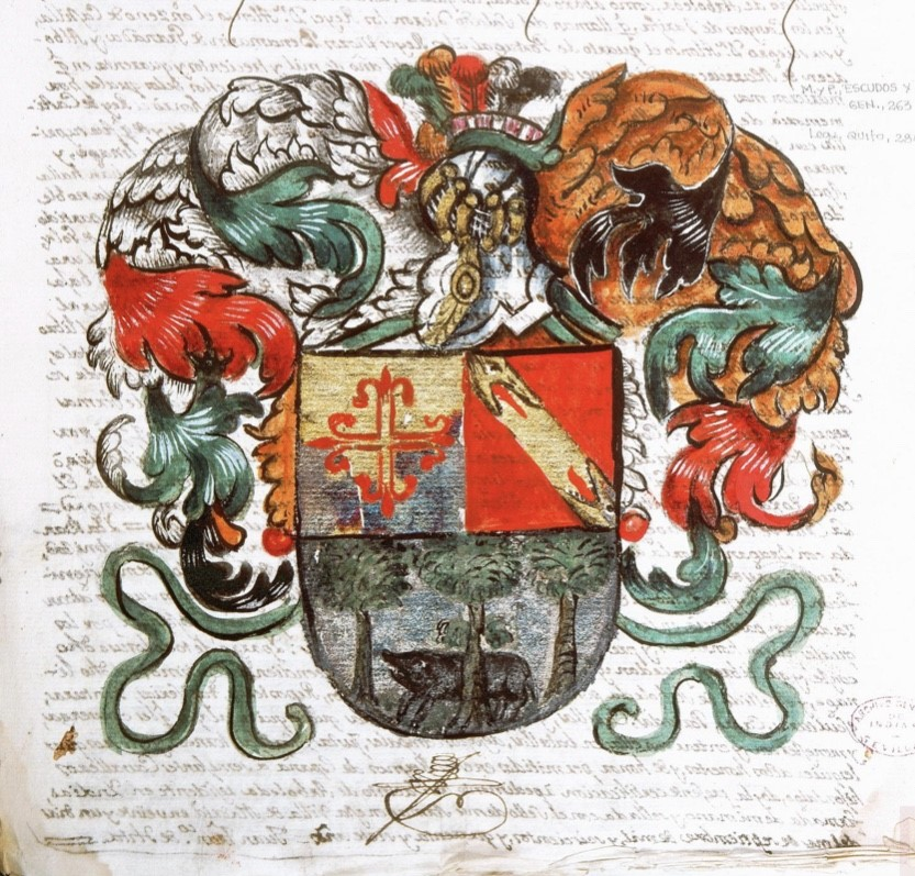 Representación heráldica en acuarela y tinta sobre papel